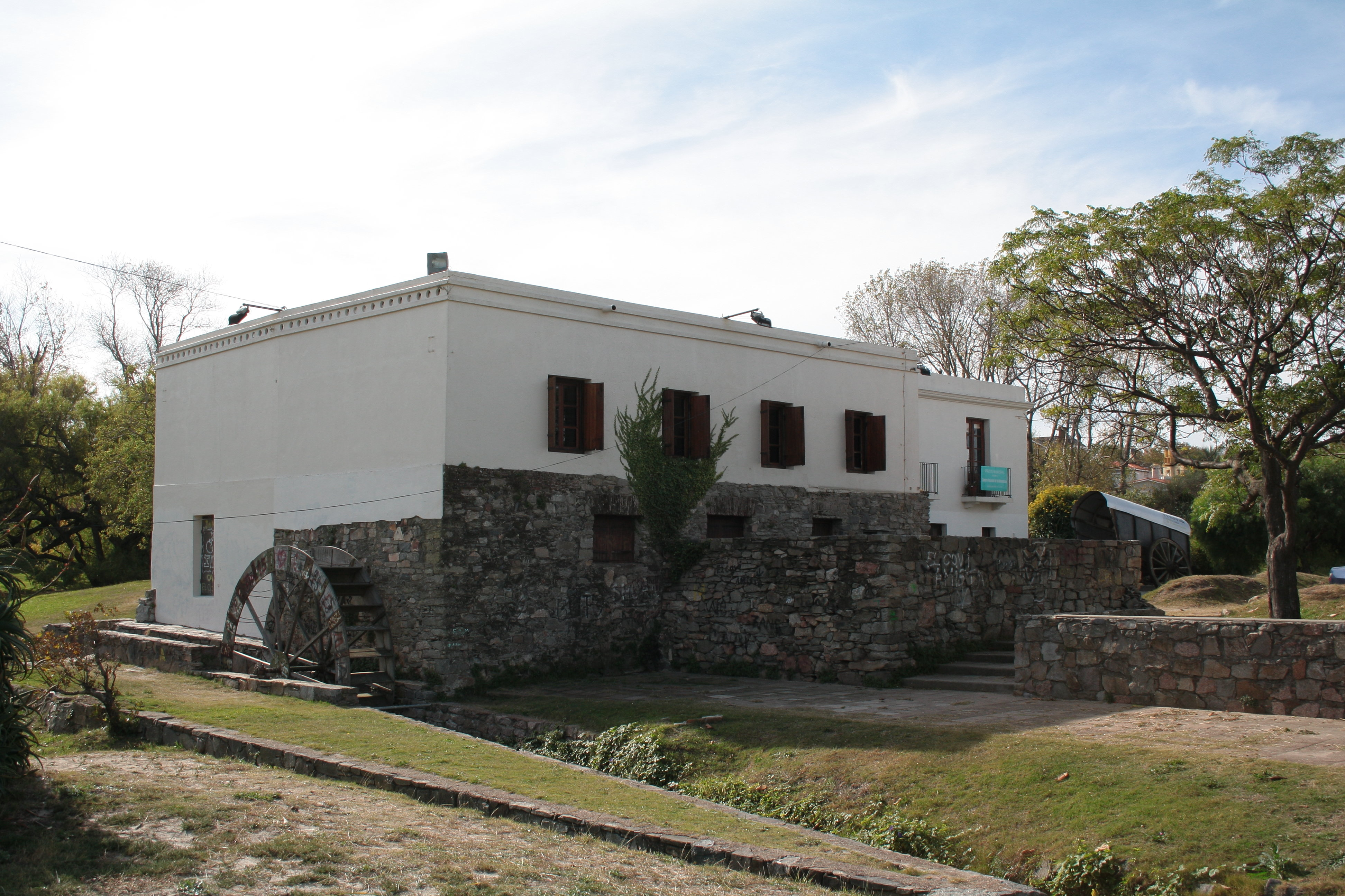 Vista de frente Molino de Perez Montevideo